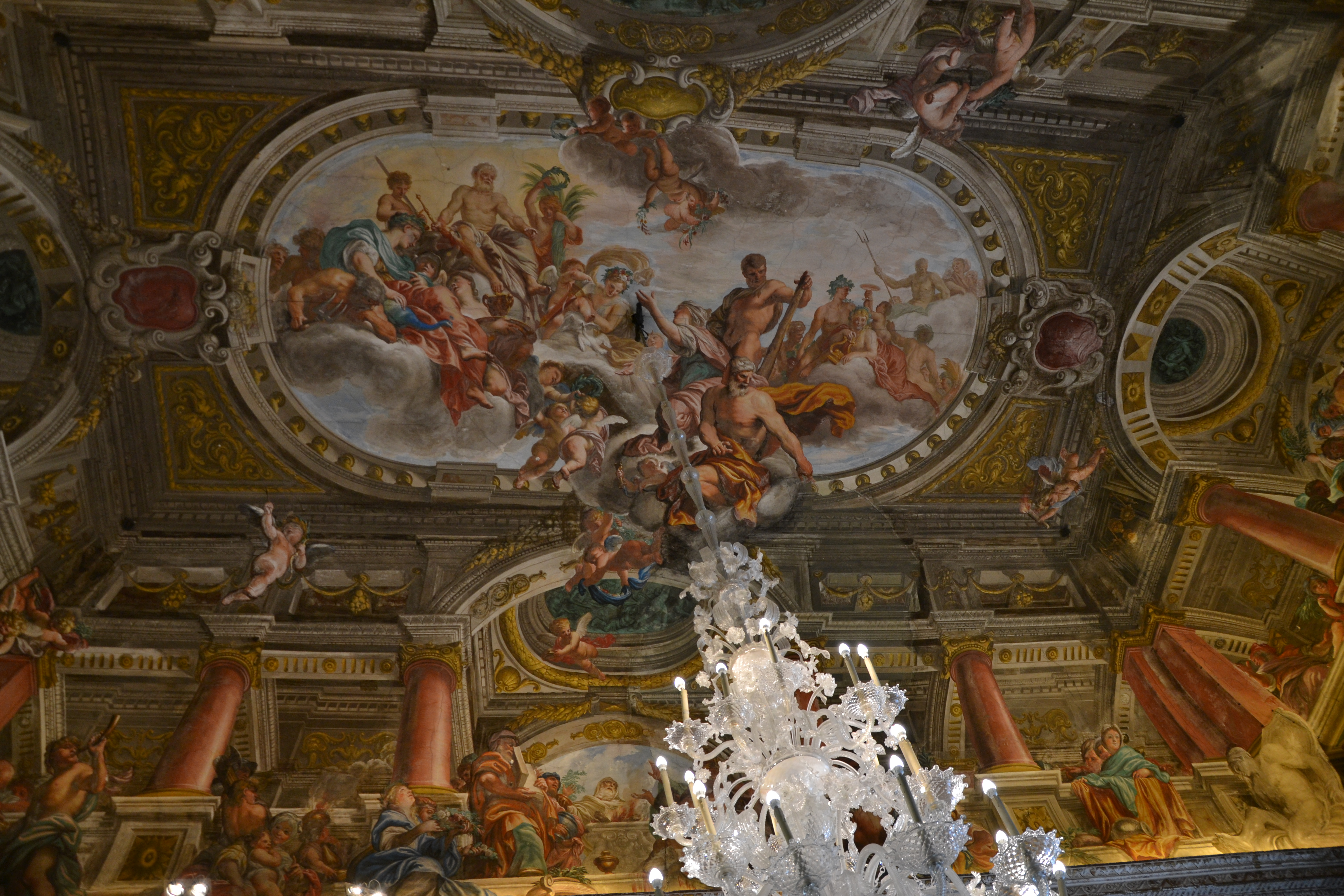 L'offerta a Giove delle chiavi del tempio di Giano, Affreschi del salone centrale del piano nobile eseguiti da Domenico Piola fra quadrature di Paolo Brozzi.